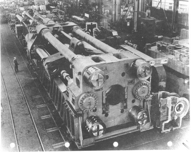 Presse hydraulique de 12 000 short ton construite dans le cadre du Heavy Press Program dans les années 1950 par Lombard Corporation et exploité par Harvey Machine Co. à Torrance, Californie.